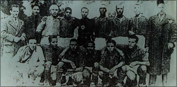 Équipe du Wydad de Casablanca en 1942